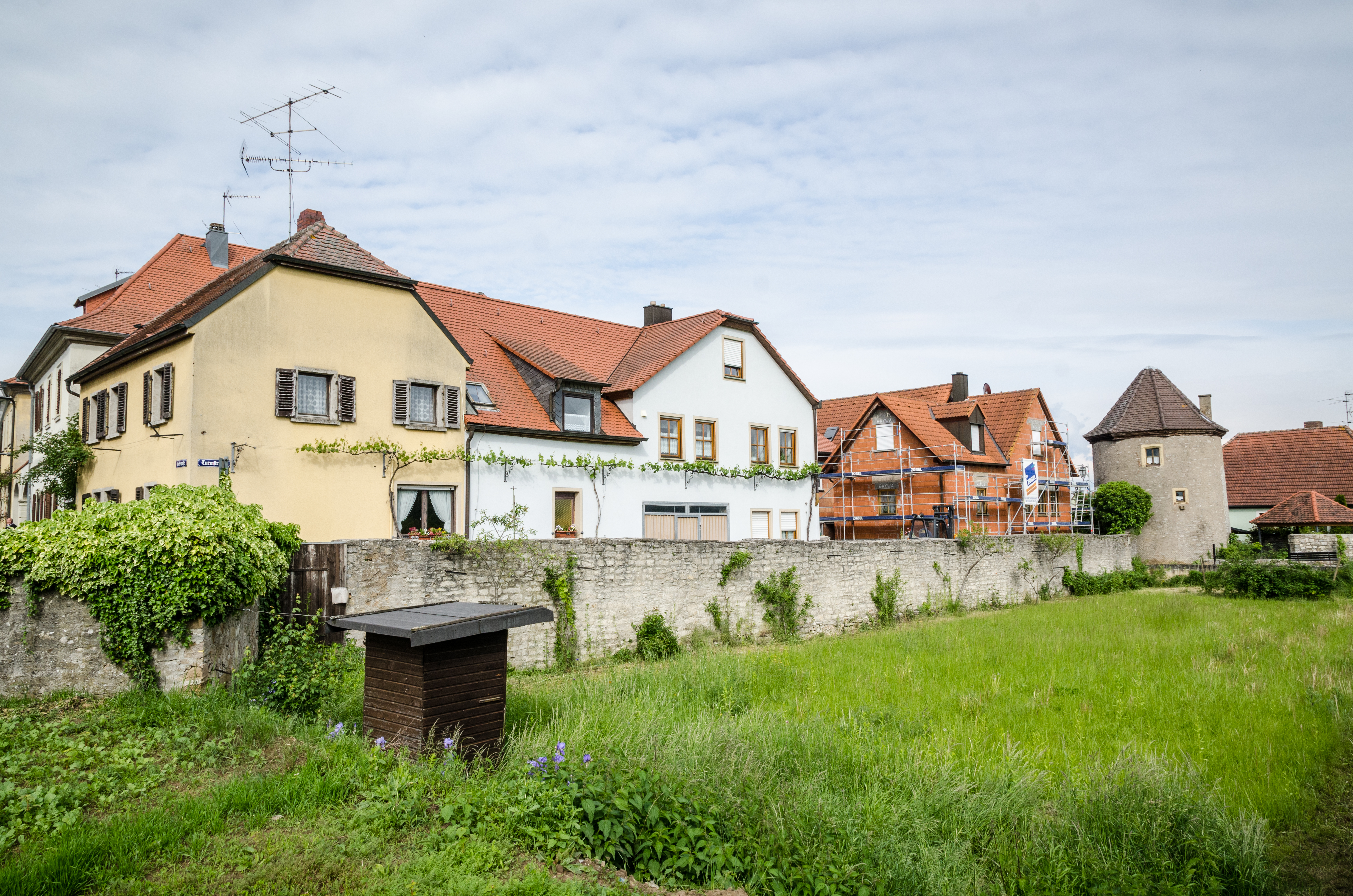 Sommerach, An der Dorfmauer, Ortsmauer